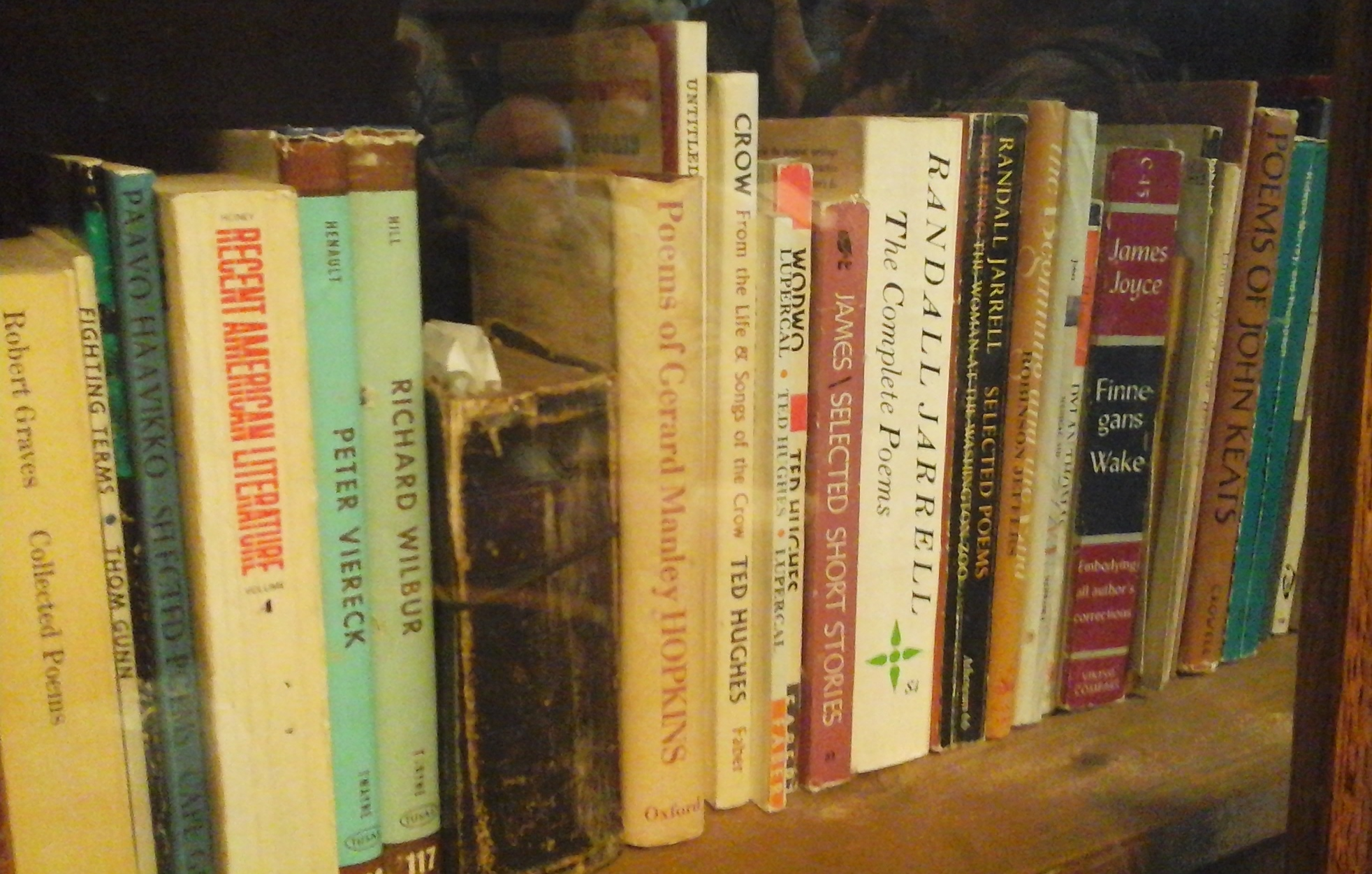 Американский кабинет Иосифа Бродского в Музее Анны Ахматовой в Фонтанном доме